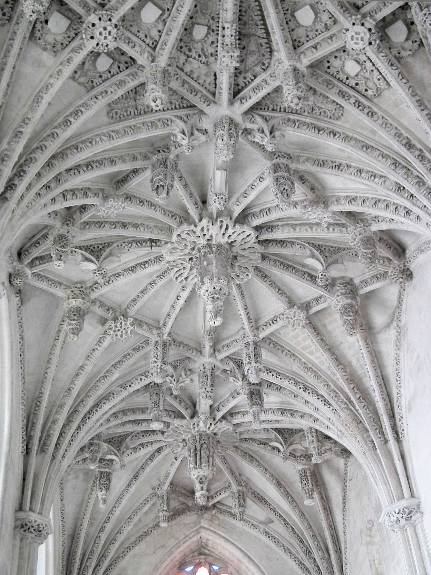 Chapelle du Saint-Esprit, Rue, France